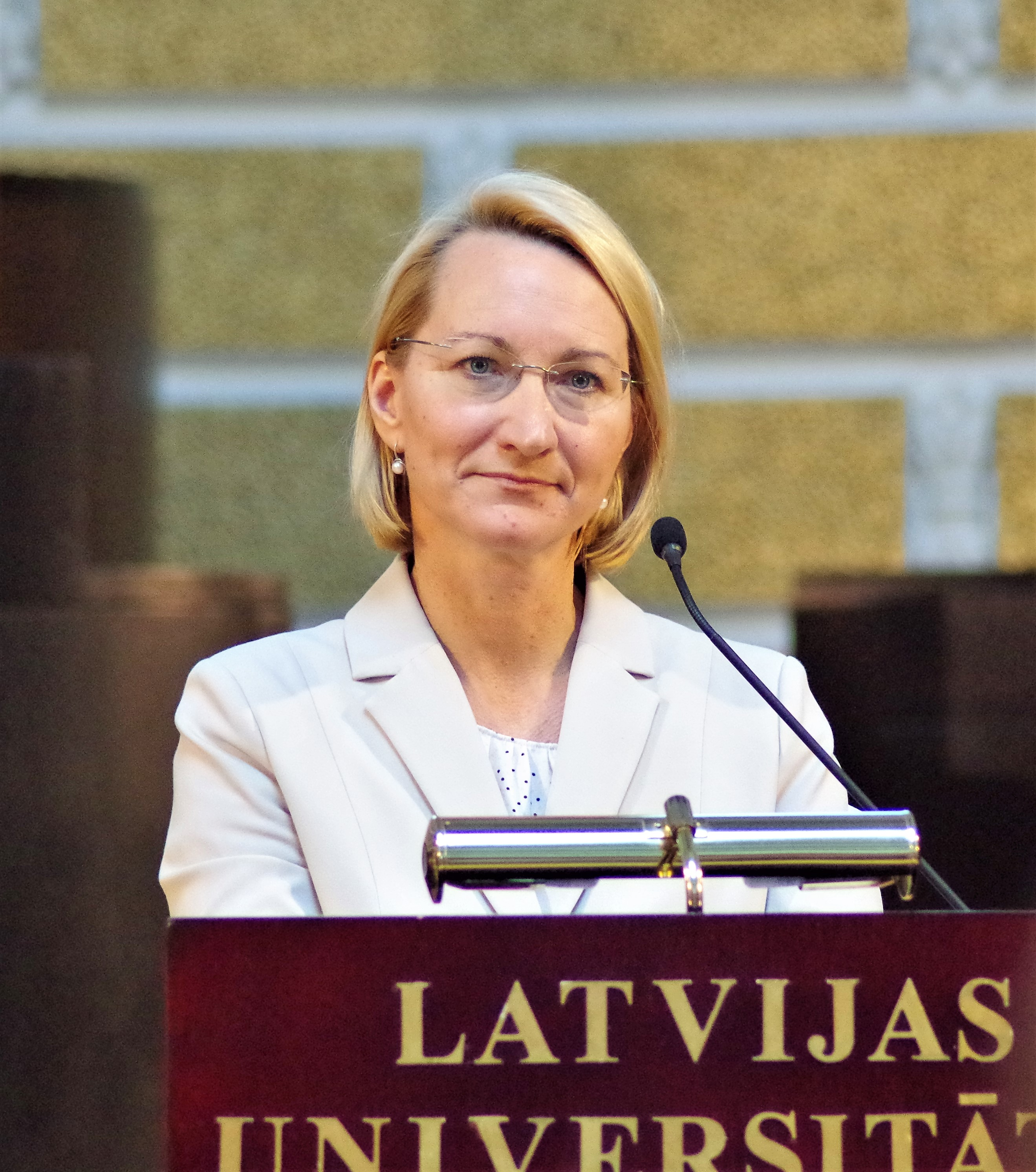 Dace Melbārde, Läti poliitik